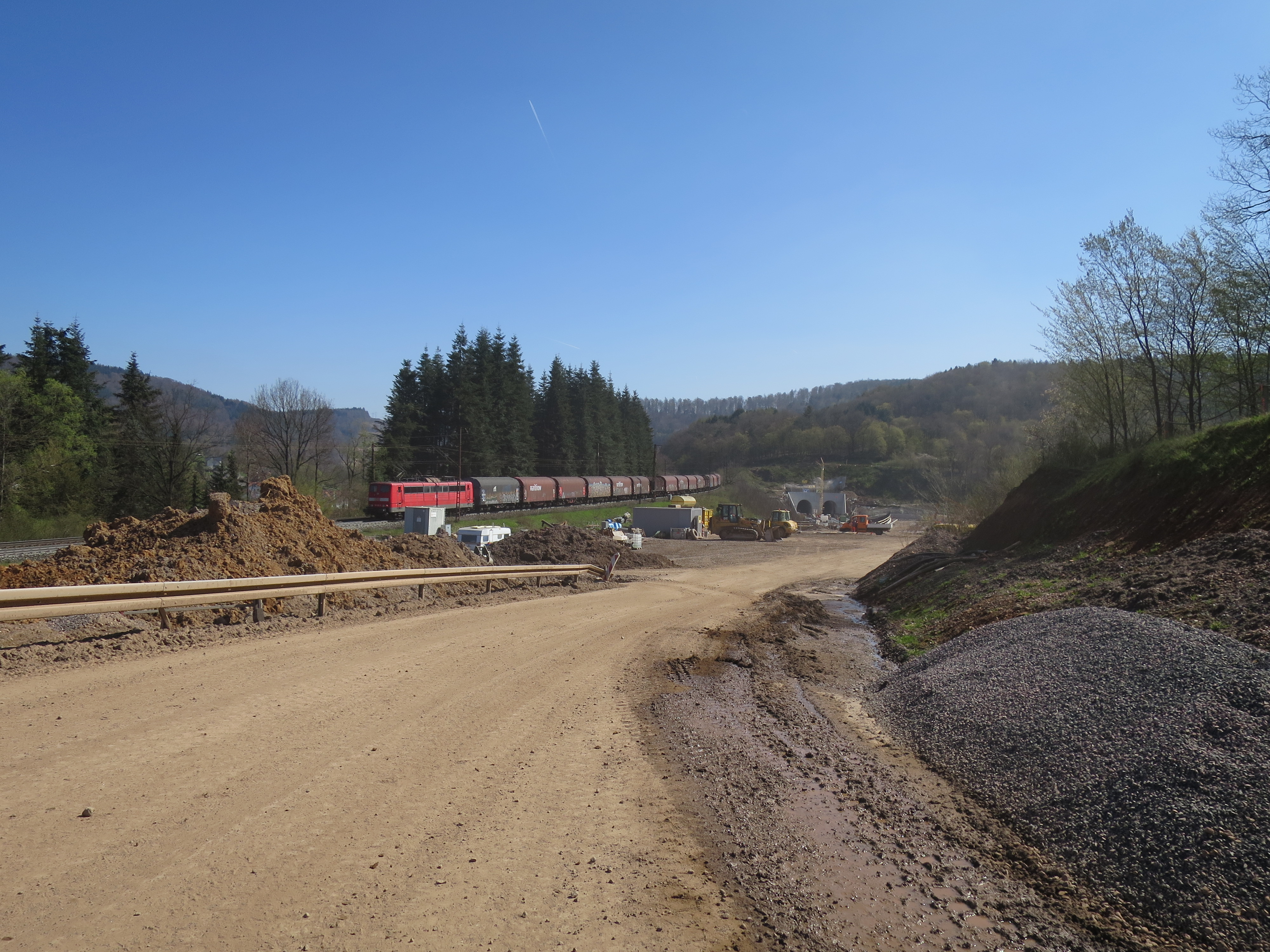 151 032-0 bei Schiebeleistung auf der Spessartrampe; im Vordergrund: Baustraße für die Neubaustrecke zur Unterfahrung des Schwarzkopftunnels